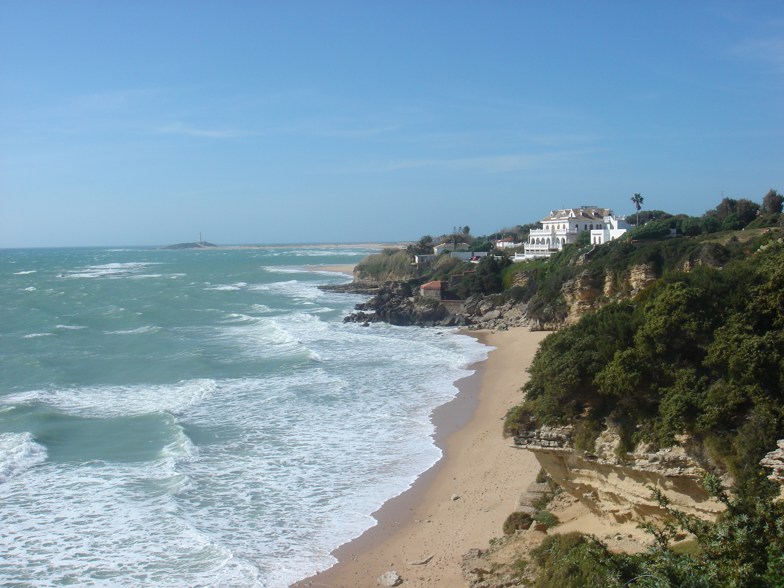 Imagen del Tómbolo de Trafalgar desde la playa de los Caños de Meca